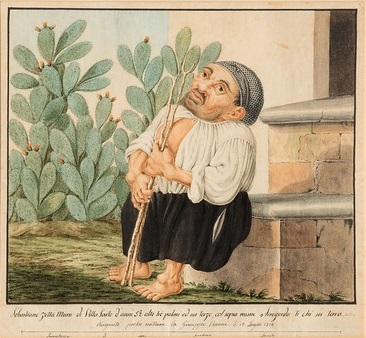 Eitratto di Sebastiano Zetta Mura di Villa Sarto, acquarello su carta, cm. 24 X 28, coll. privata